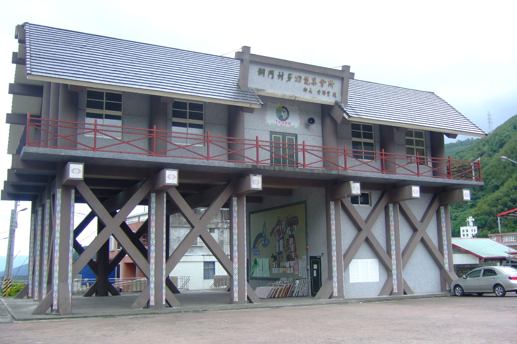 中文（台灣）: 花蓮縣秀林鄉銅門村多功能集會所。